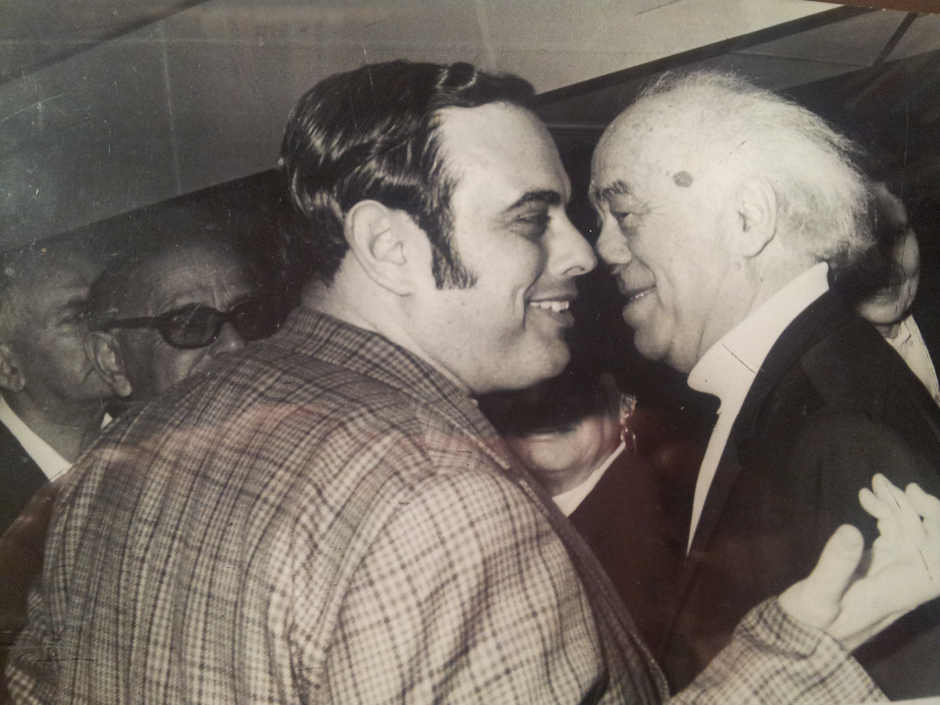 אברהם שלונסקי ואליקים ירון